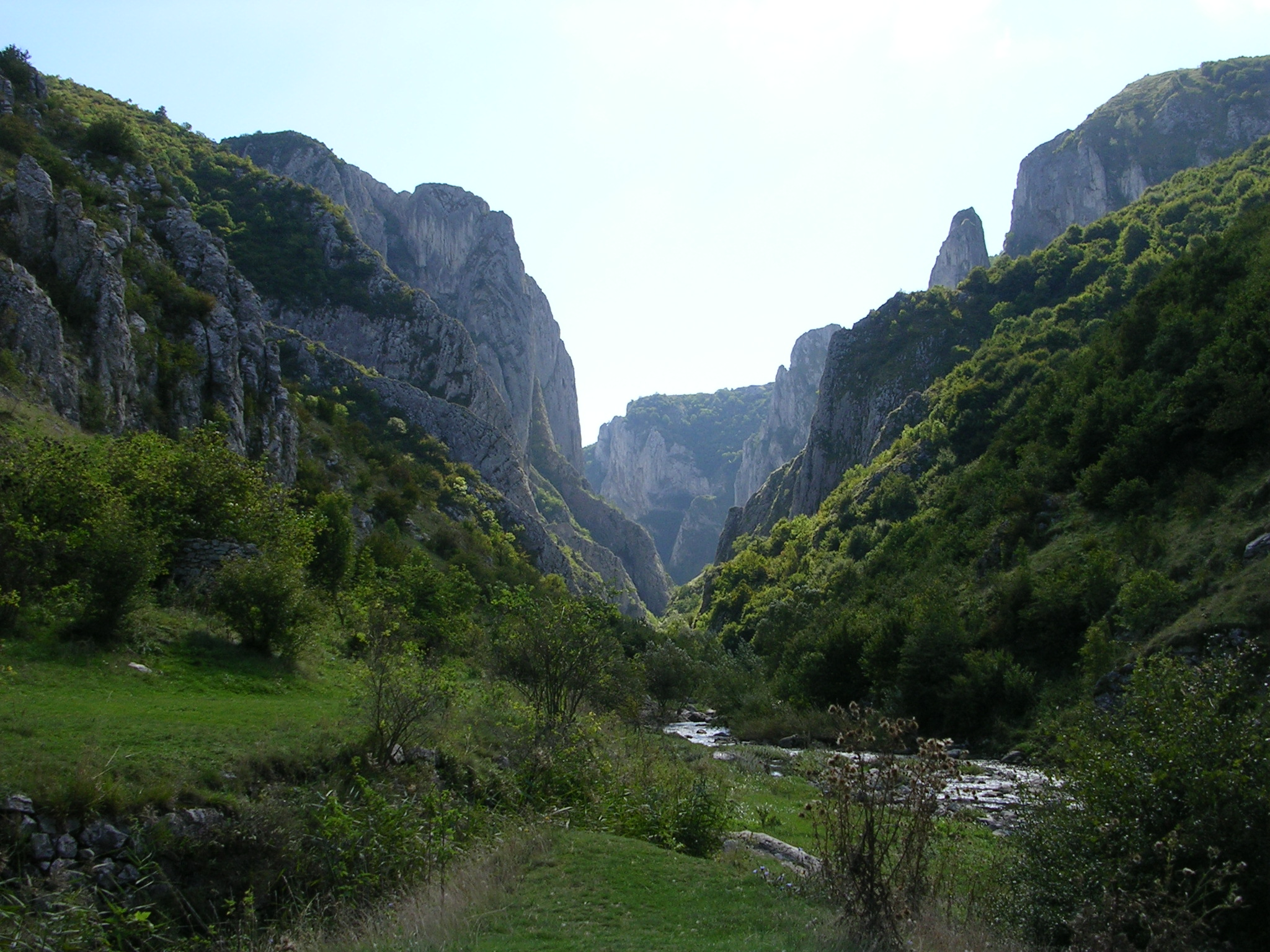 Cheile Turzii, Raul Hasdate (Hasdate stream)